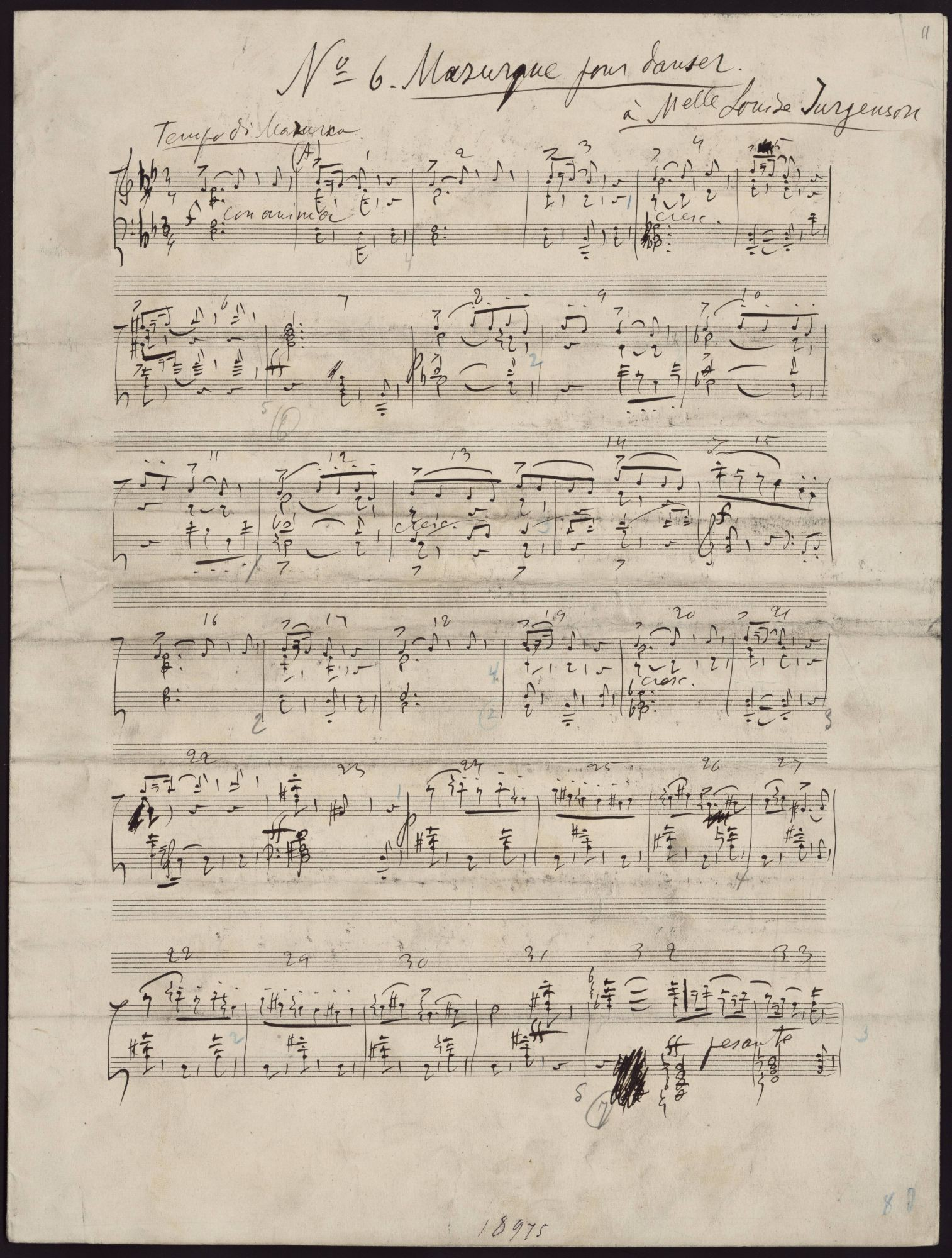 Мазурка П.И.Чайковского